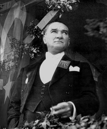 Cumhurbaşkanı Mustafa Kemal Atatürk'ün 29 Ekim 1933'te çekilmiş fotoğrafıdır.